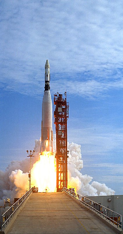 Gemini 11 - Atlas-Agena Start